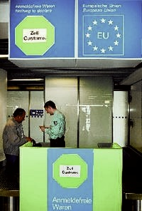 Überarbeitung von Bild:Zollkontrolle.jpg (eigenes Foto von Anomalie01)